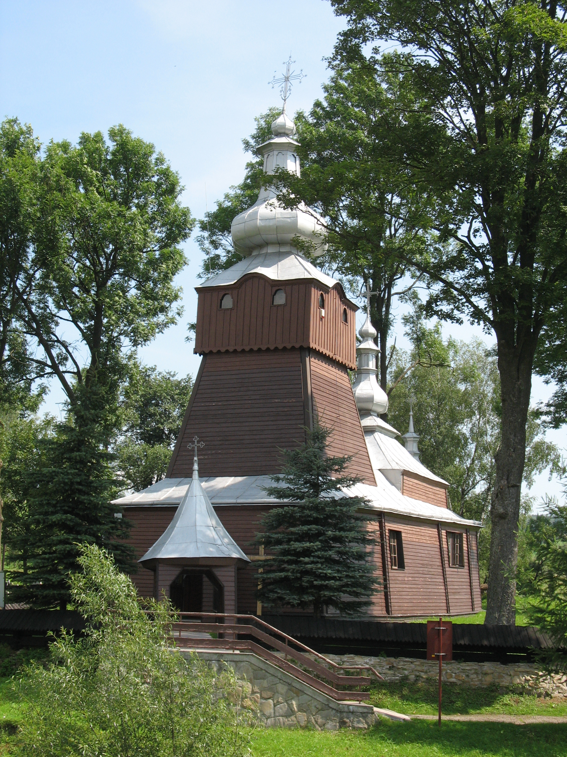 Dawna cerkiew greckokatolicka w Muszynce (obecnie kościół rzymskokatolicki)